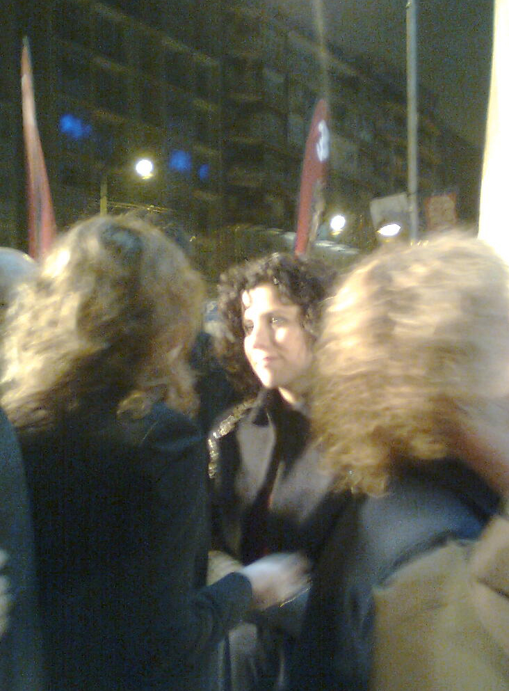 L'actriu Anna Sahun als III Premis Gaudí